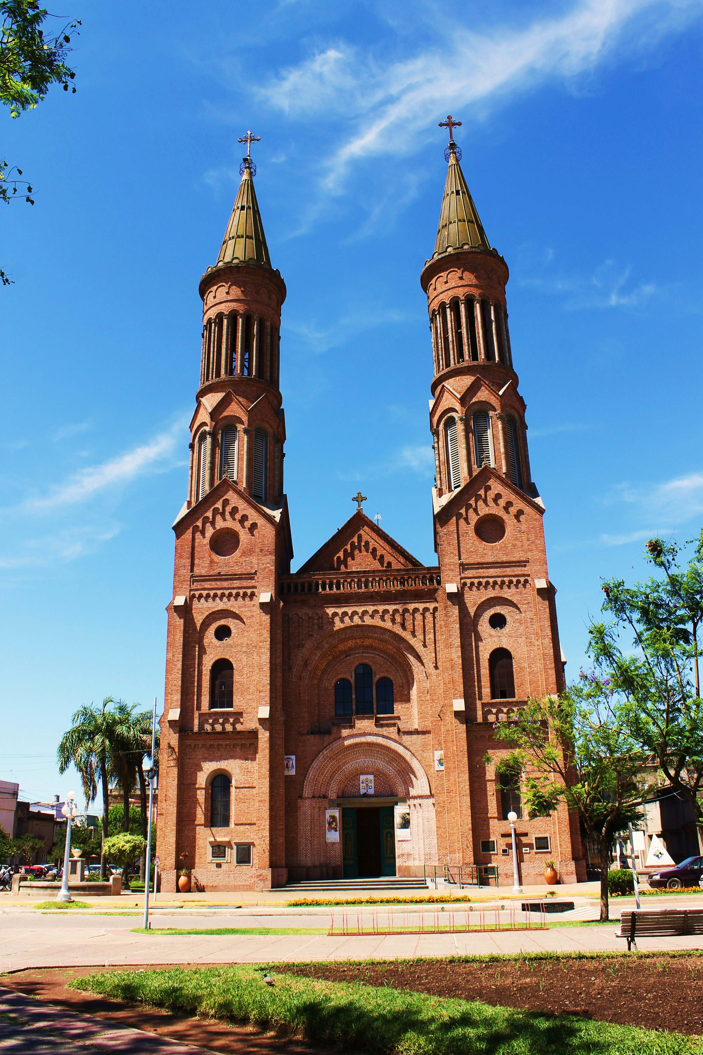 Basílica de la Natividad de la Santísima Virgen, Esperanza, Santa Fé, Argentina.